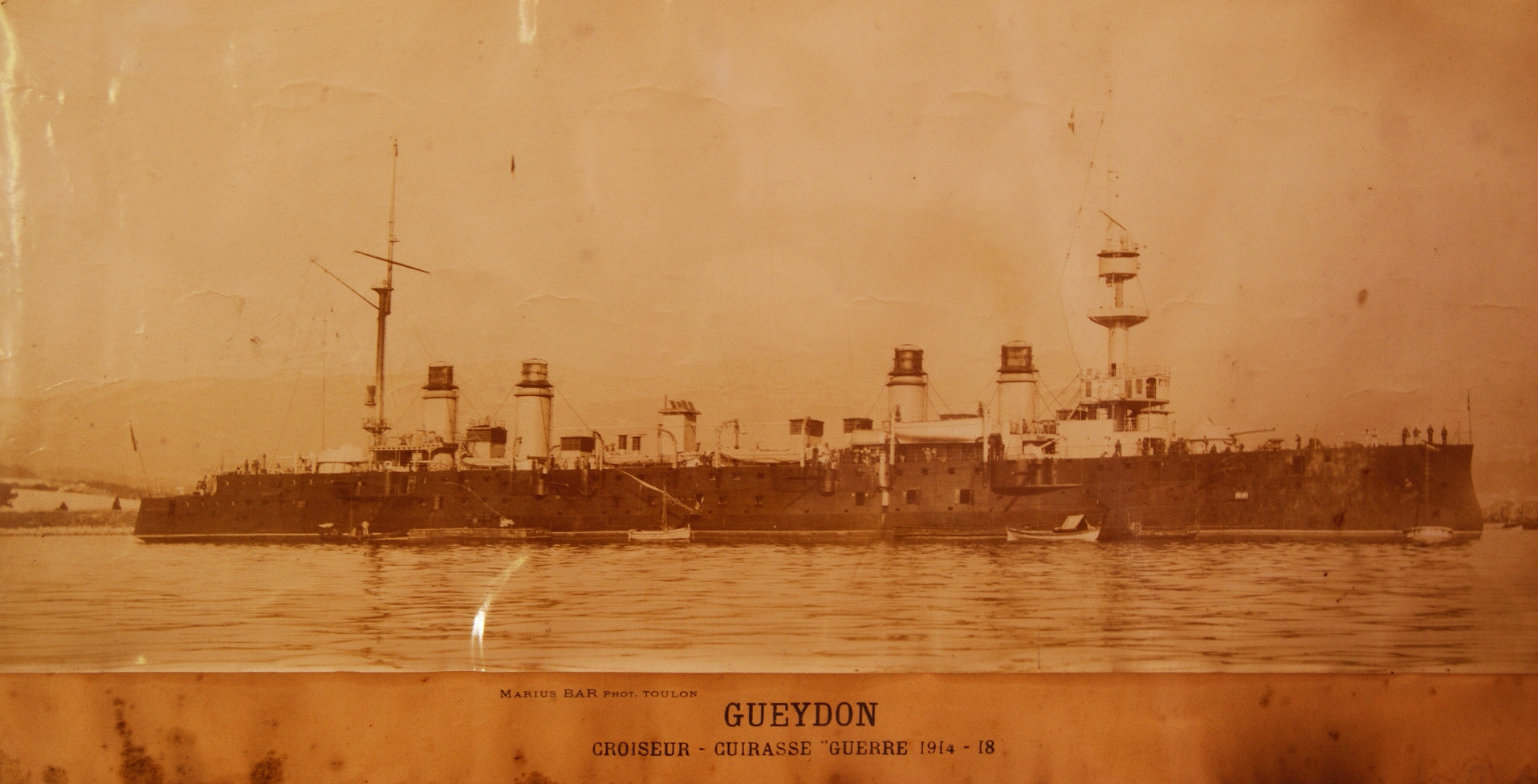 Croiseur cuirassé guerre 1914-1918